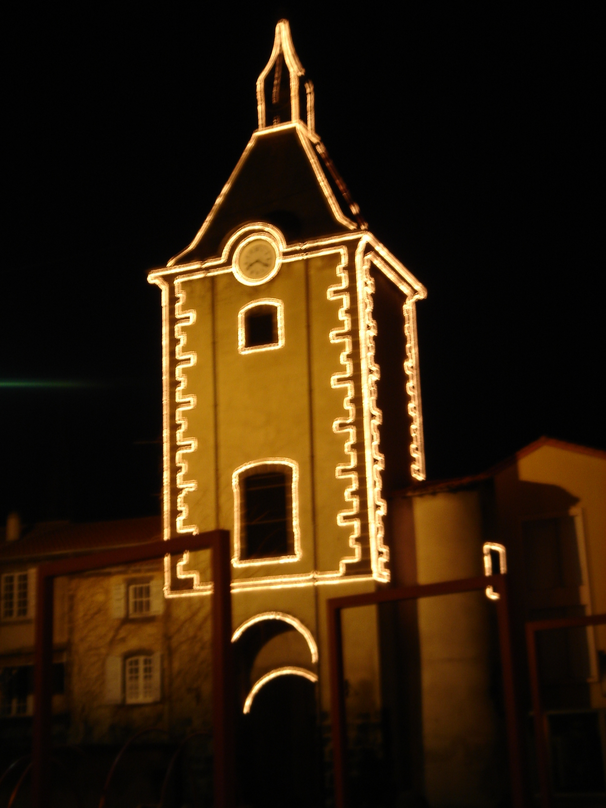 Porte de ville de Cébazat